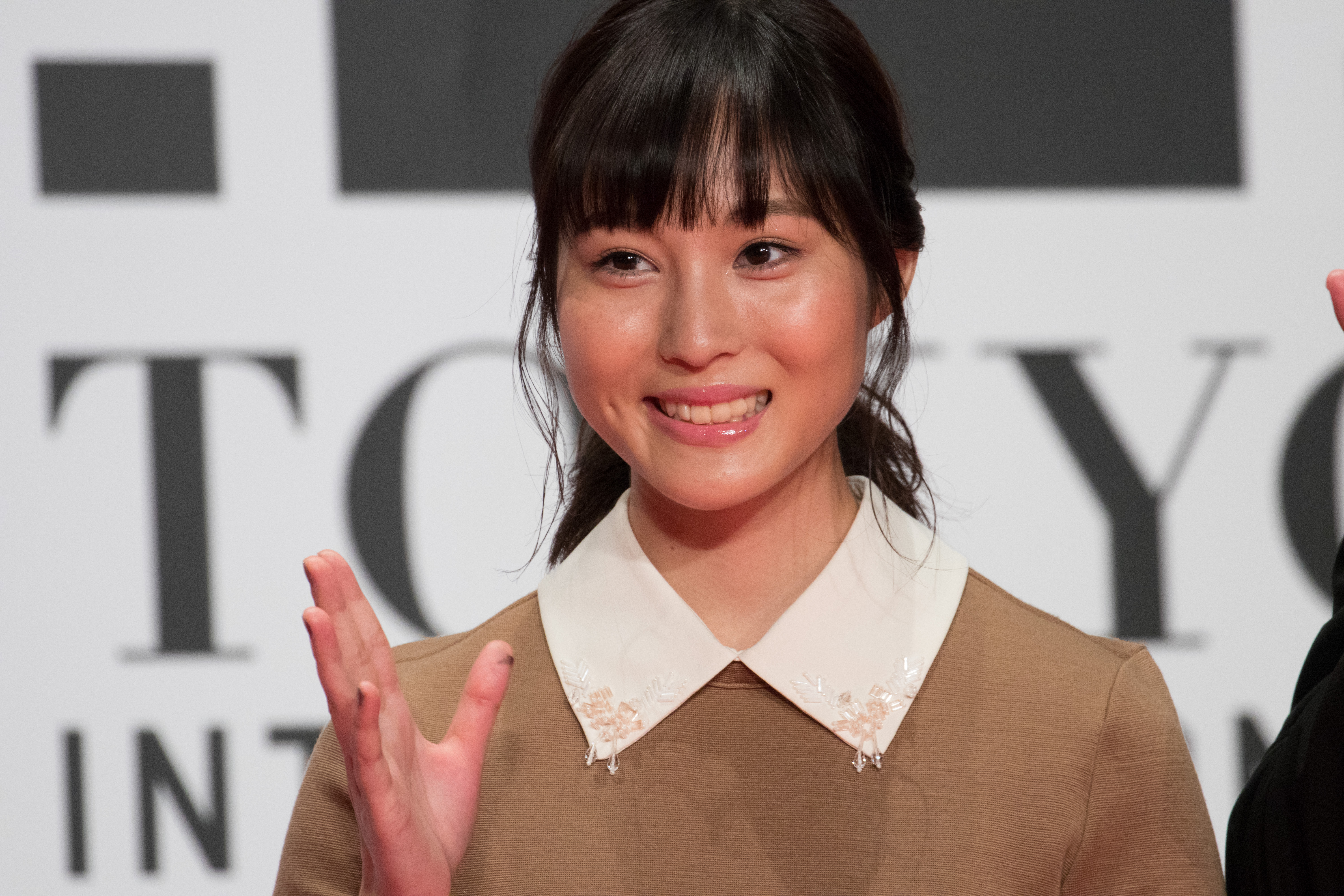 第29回 東京国際映画祭 オープニングセレモニー 松本花奈